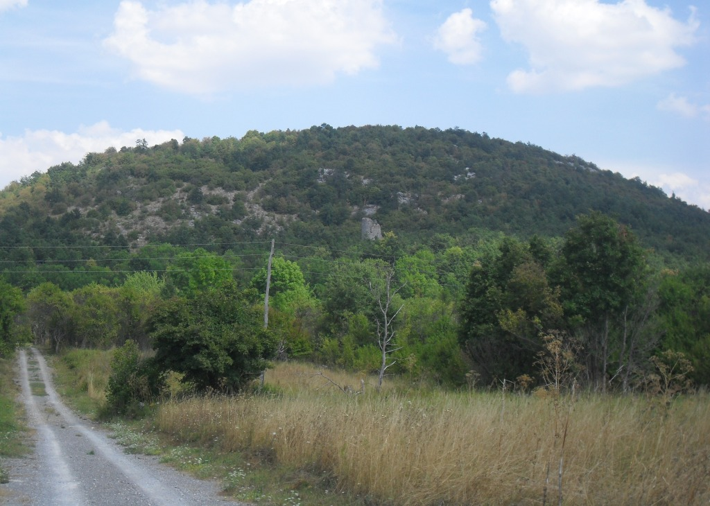 Кулина Штулић у засеоку Доња Плоча, Горња Плоча, Лика.